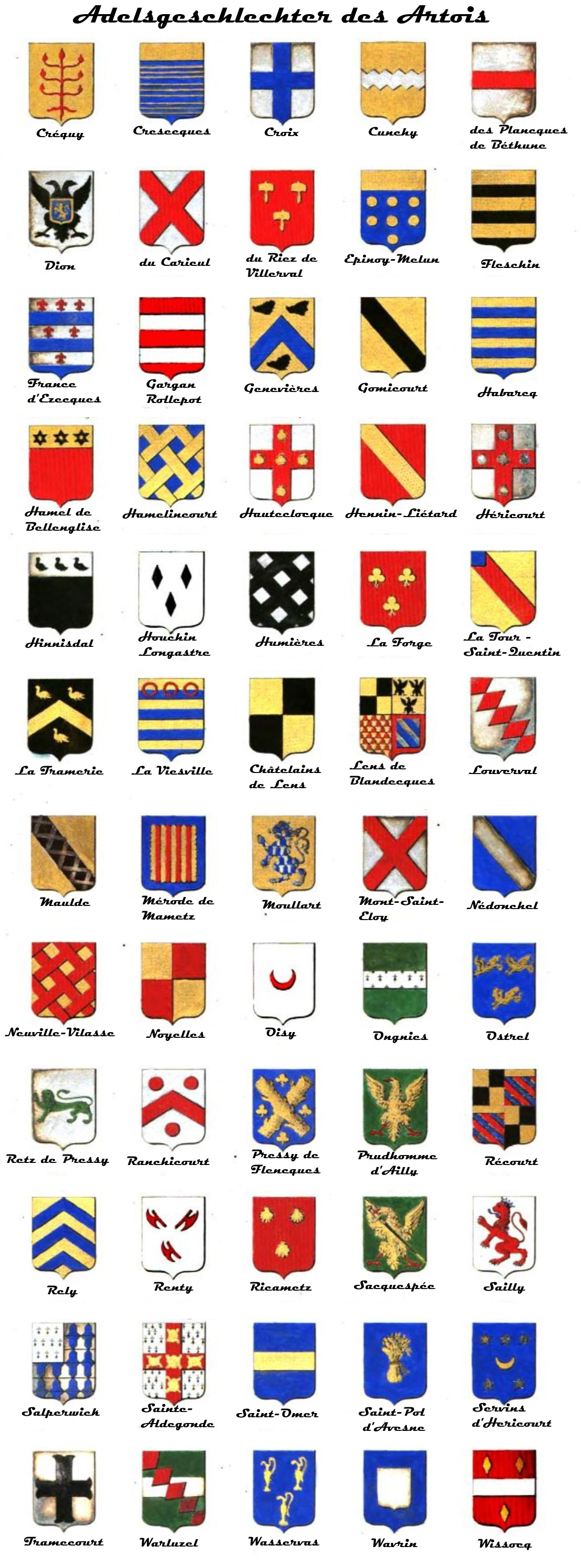 Nobles du comté d'Artois